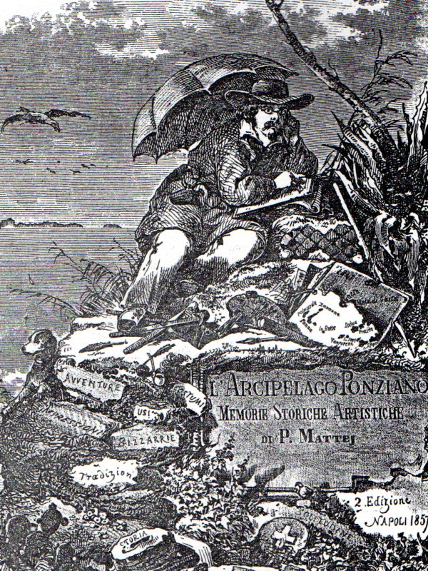 Frontespizio di Arcipelago Ponziano, memorie storiche ed artistiche di Pasquale Mattej